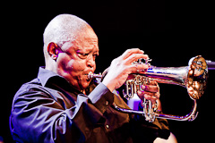 111030 Hugh Masekela foto eric van nieuwland 10